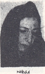 تصویر سکینه قاسمی مشهور به پری بلنده